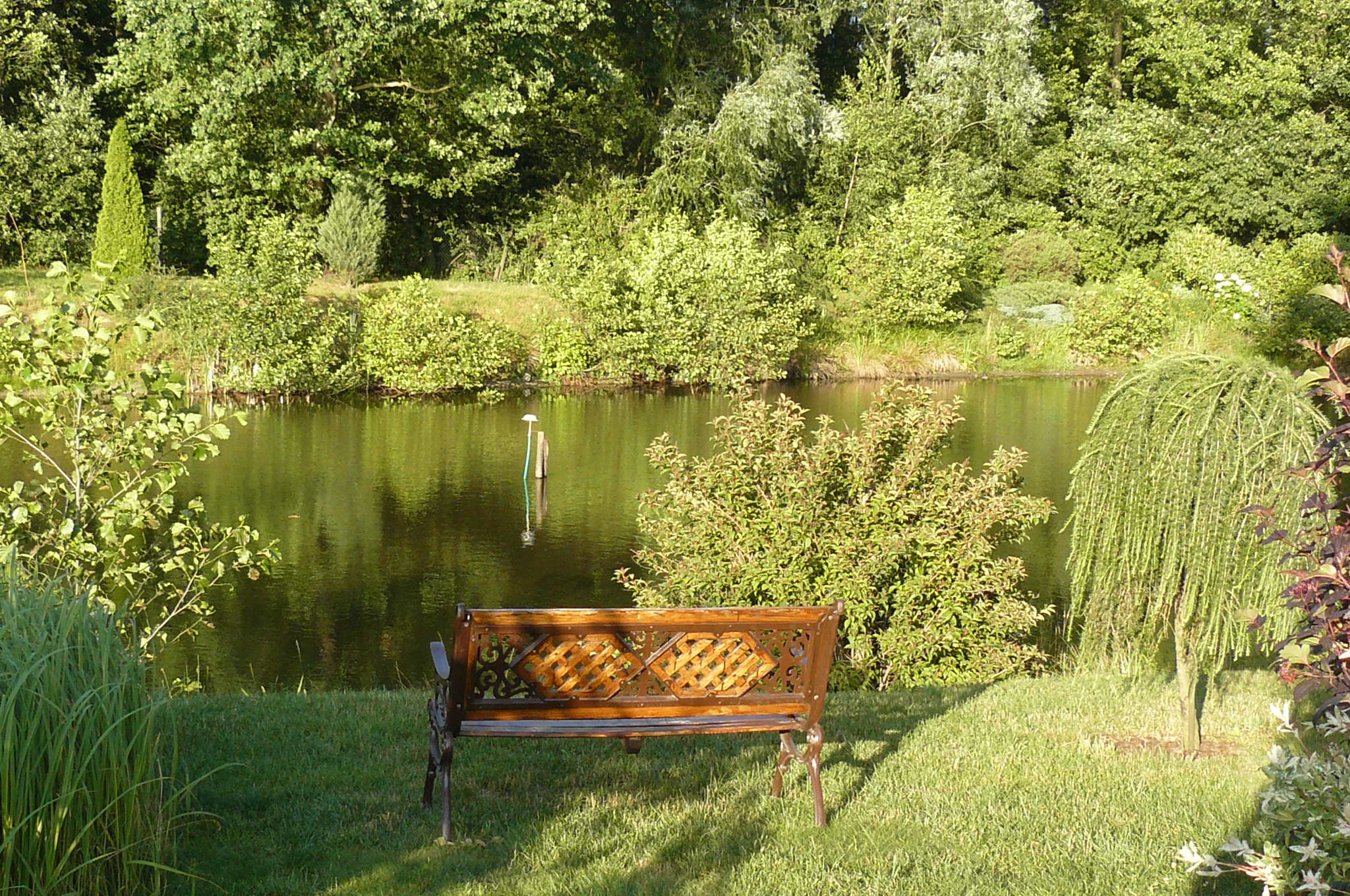 Rokocin - park przy stadninie Hubertus.